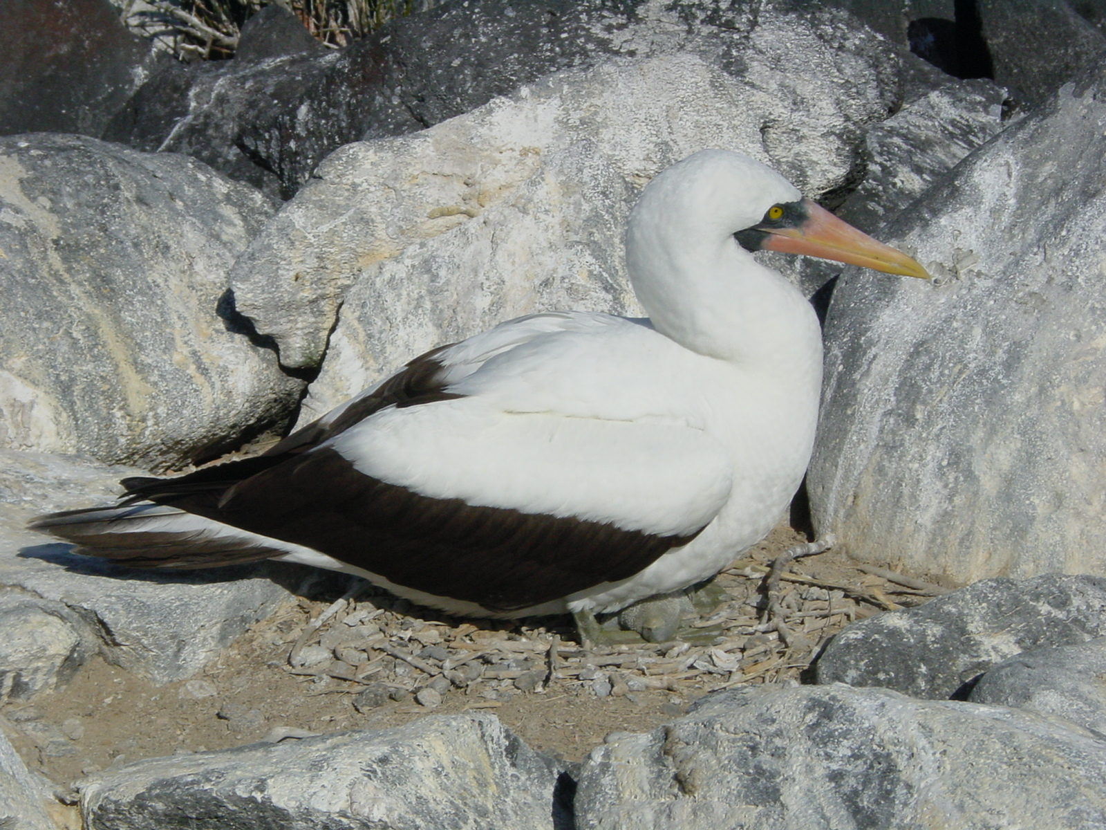 Sula granti, Nazca Booby from Galapagos